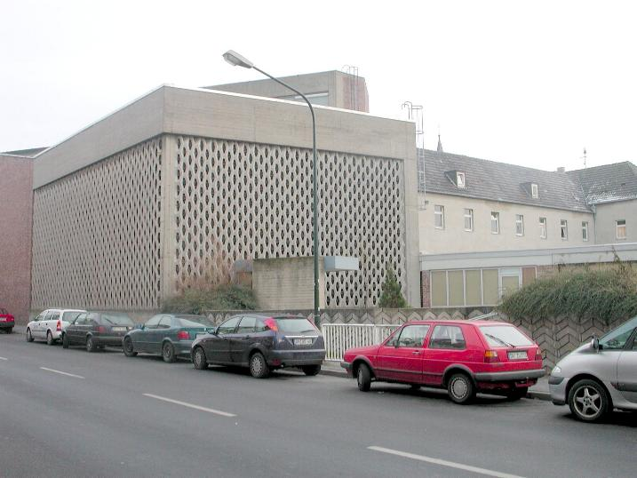 Sankt Peter Julian in Düren